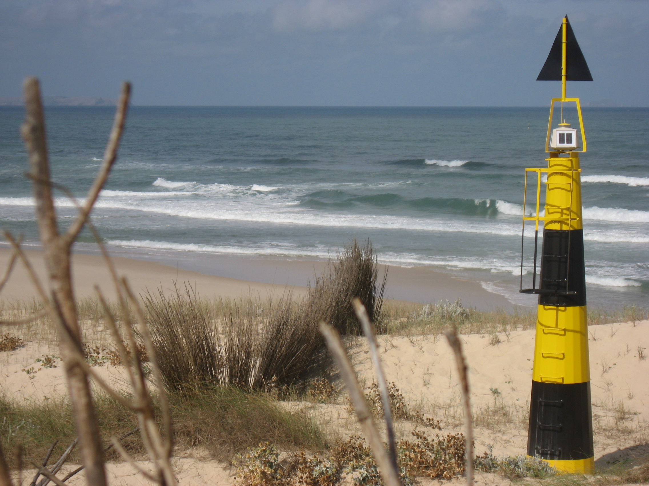 Seefahrtszeichen an Land und im Wasser zur Markierung des Standorts des "Wave Roller" Wellenkraftwerk am Strand von Almagreira (nördlich von Baleal-Peniche in Portugal). Die Anlagen stehen zwischen den Markierungen am Meeresgrund.